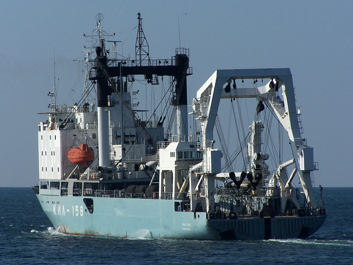 Килекторное судно "КИЛ-158". Проект 141. Севастополь. Черноморский флот РФ.